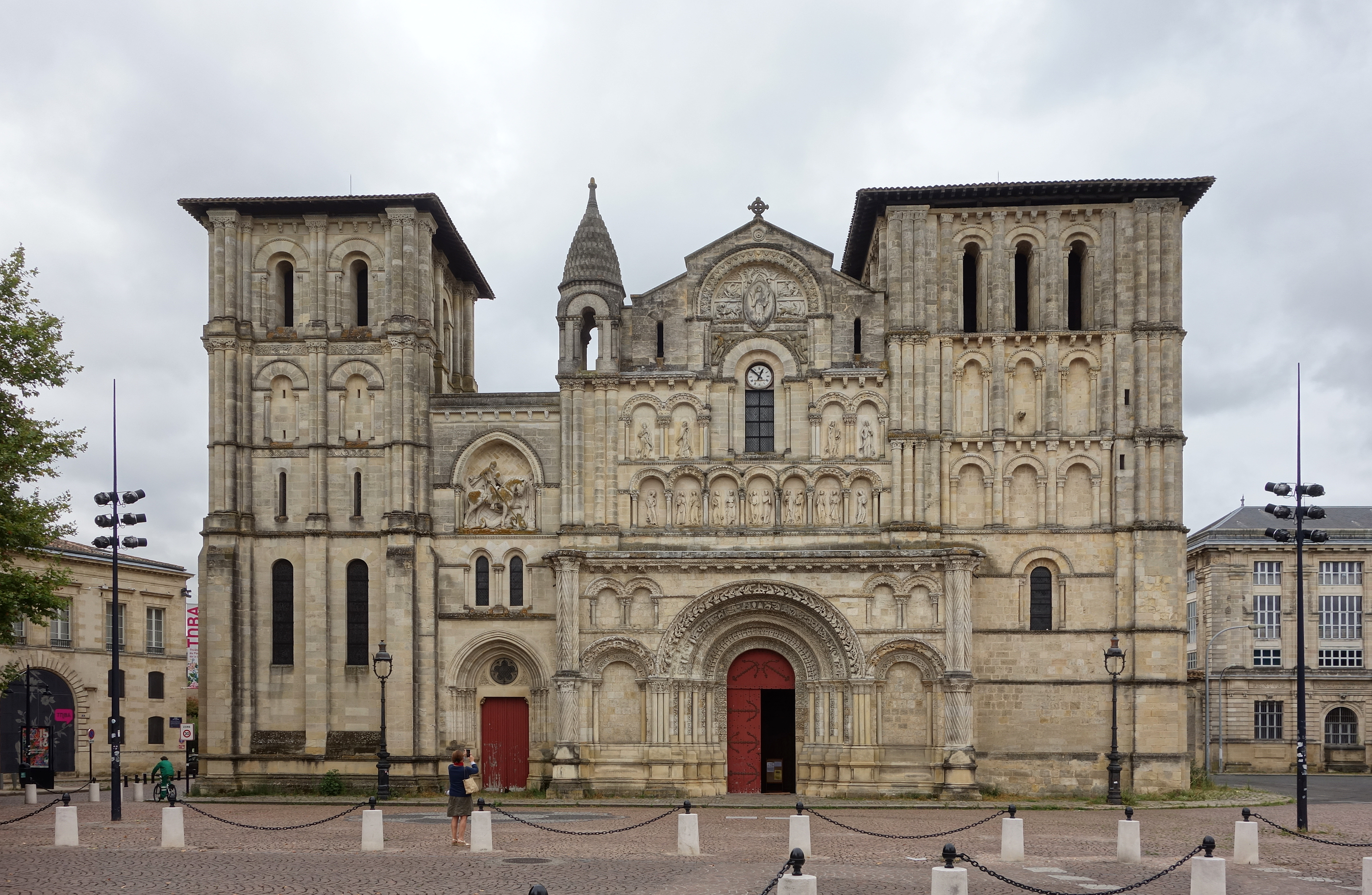 La façade de l'Église Sainte-Croix de Bordeaux.